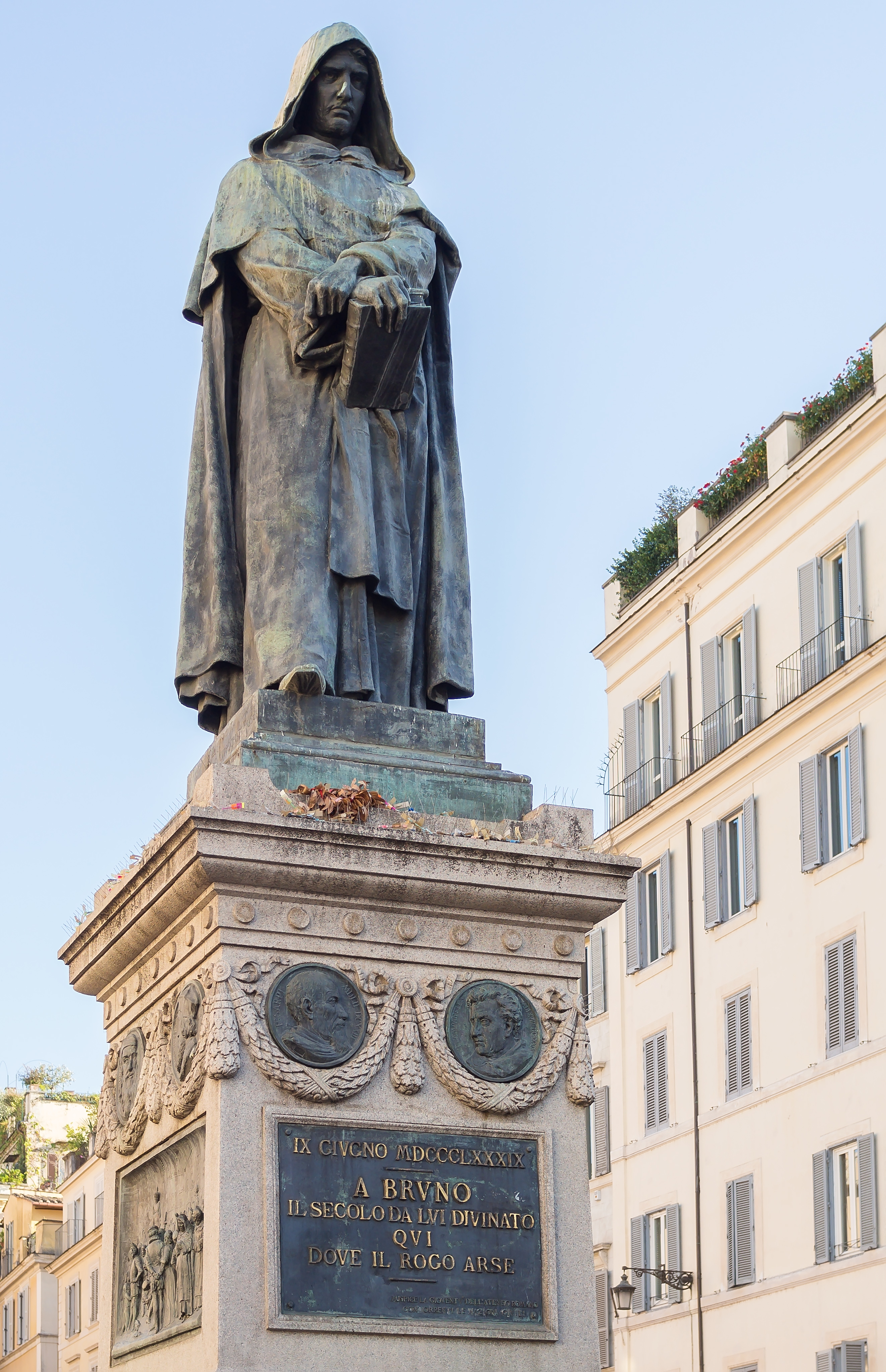 Monumento a Giordano Bruno This is a photo of a monument which is part of cultural heritage of Italy.